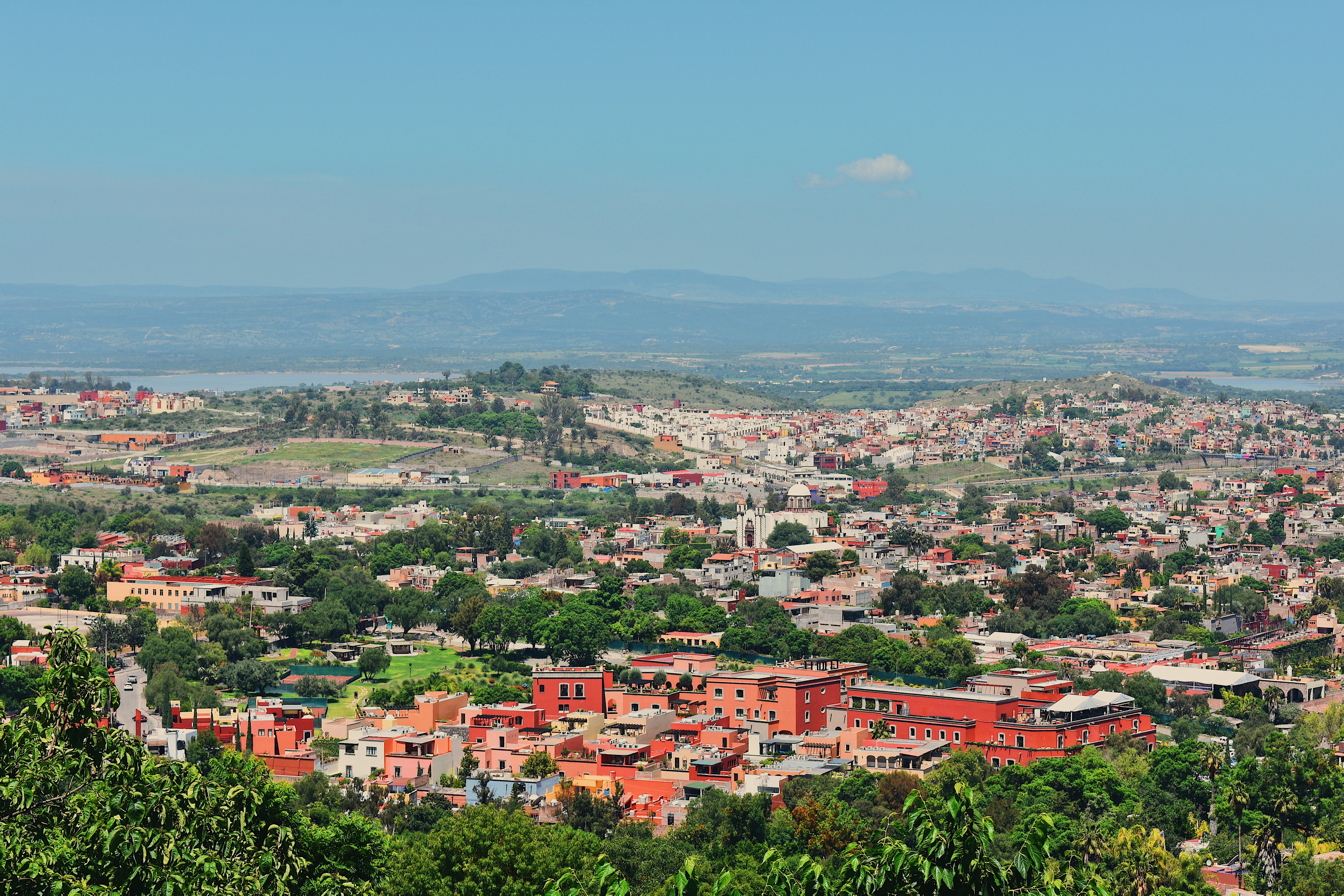 Imagen areal hacía la el centro de San Miguel de Allende, Guanajuato, México.